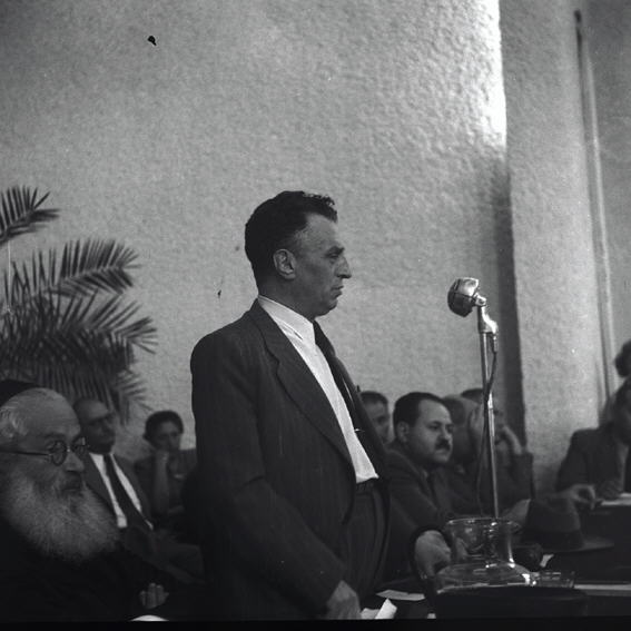 ד"ר אברהם גרנות נואם בכינוס "קול האדמה" תש"ו בהר-הצופים , ירושלים